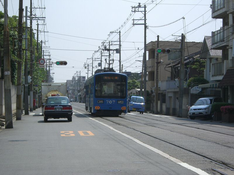 Hankai_Tramway（阪堺電気軌道上町線）